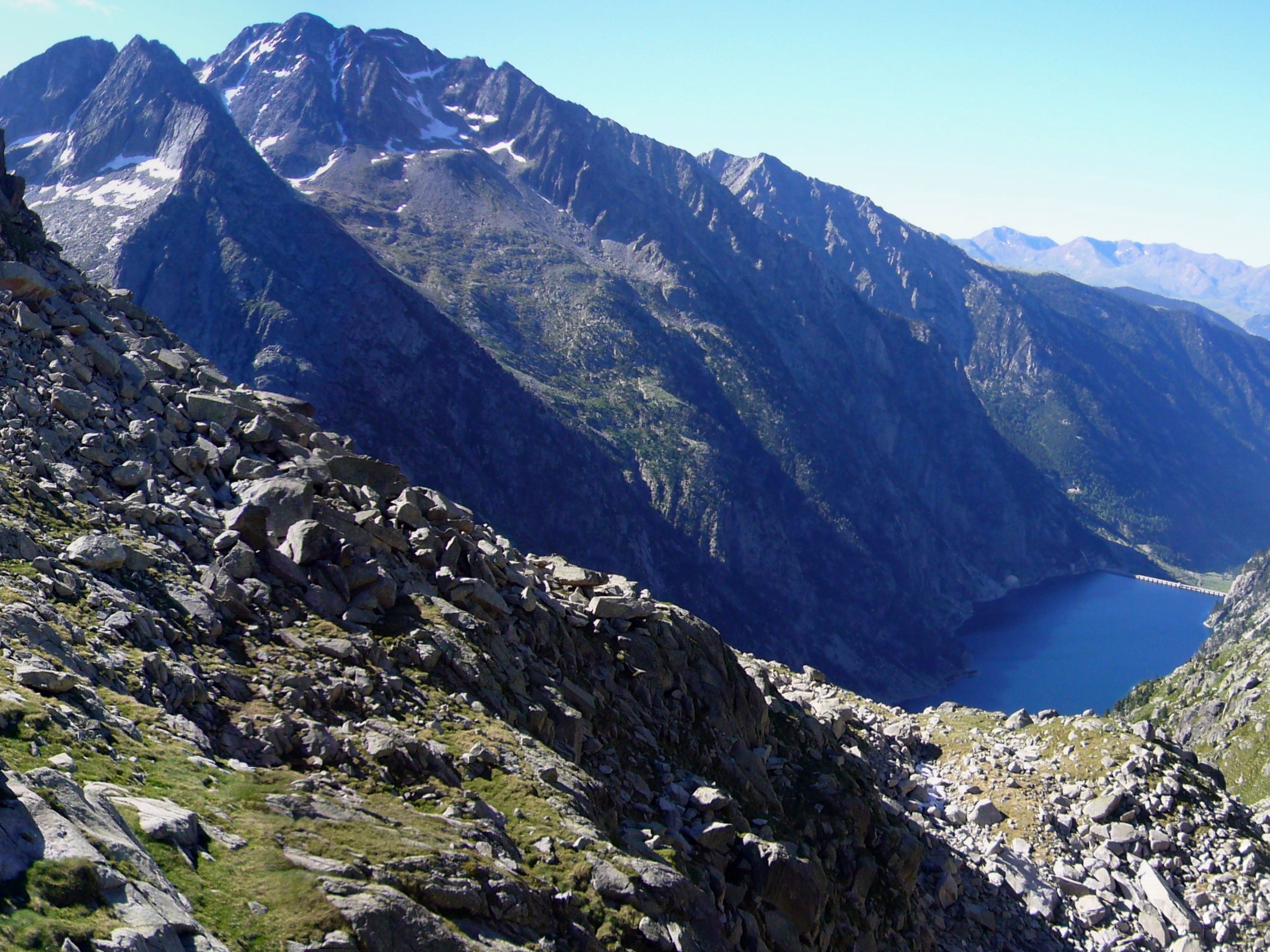 Capçalera de Caldes vista a mig camí entre l'Estany de Tumeneia de dalt i de la Bretxa de Pauss; la Vall de Boí, Alta Ribagorça, Catalunya